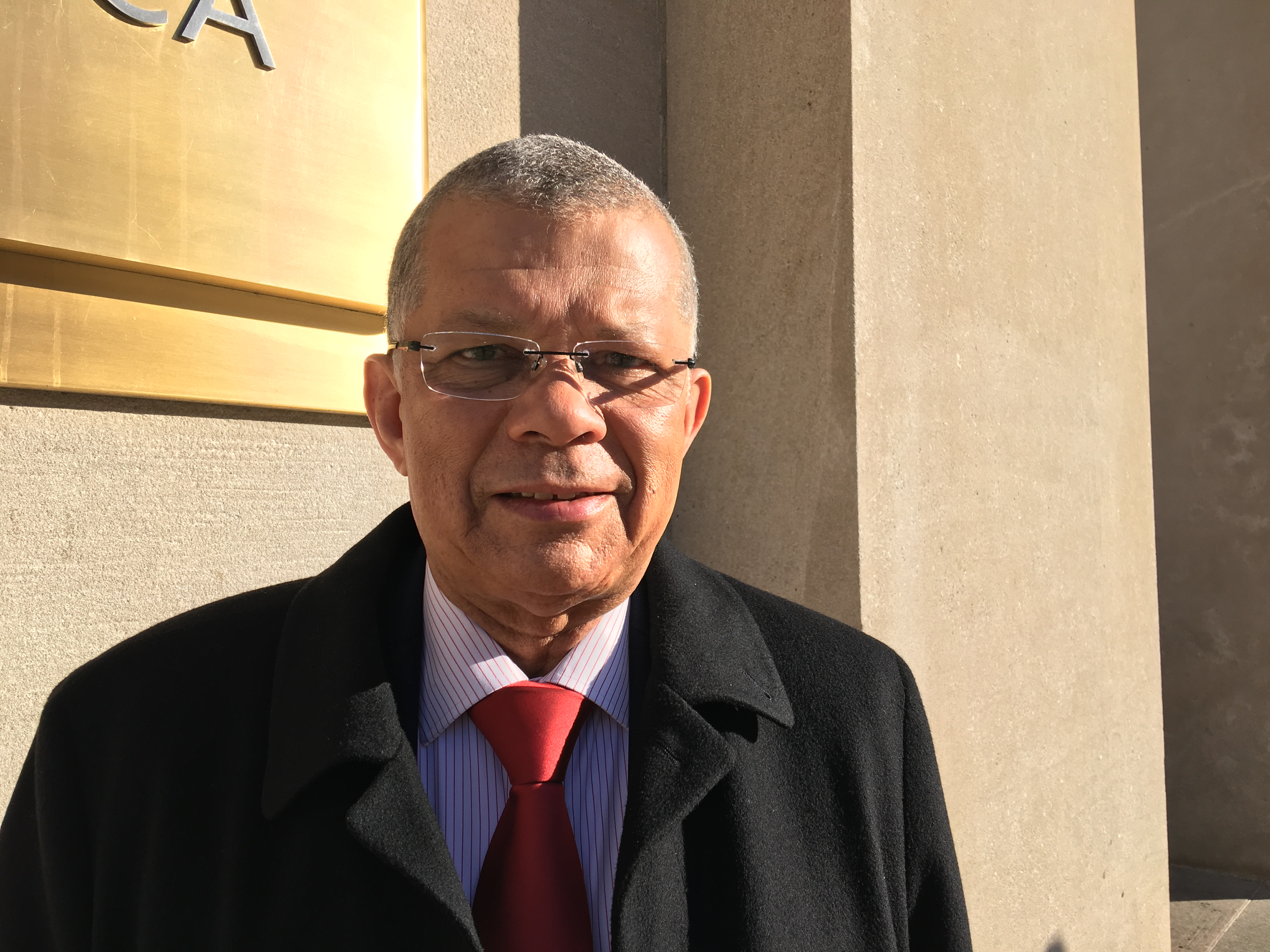 Carlos Veiga, político de Cabo Verde, primer ministro entre 1991 y 2000.